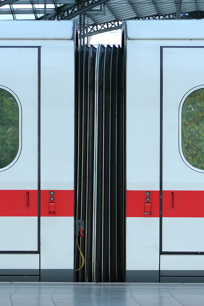 Druckdichter Faltenbalg als Wagenübergangslösung im ICE1